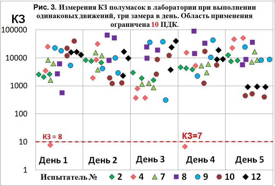 Иллюстрация к статье Респиратор, показывающая как непостоянны защитные свойства одного и того же СИЗОД при его носке одним и тем же рабочим